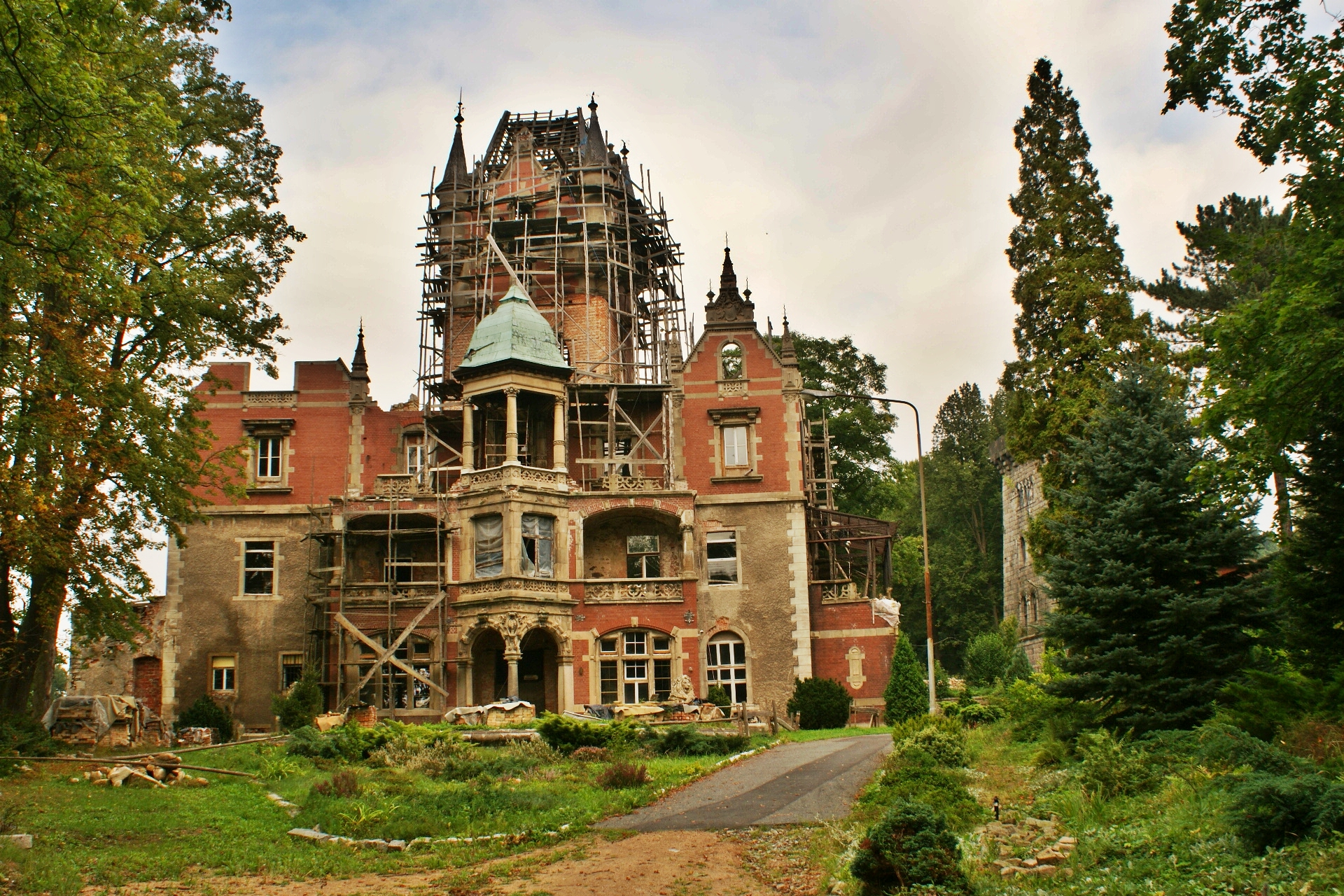 Bobrów - pałac - ruina